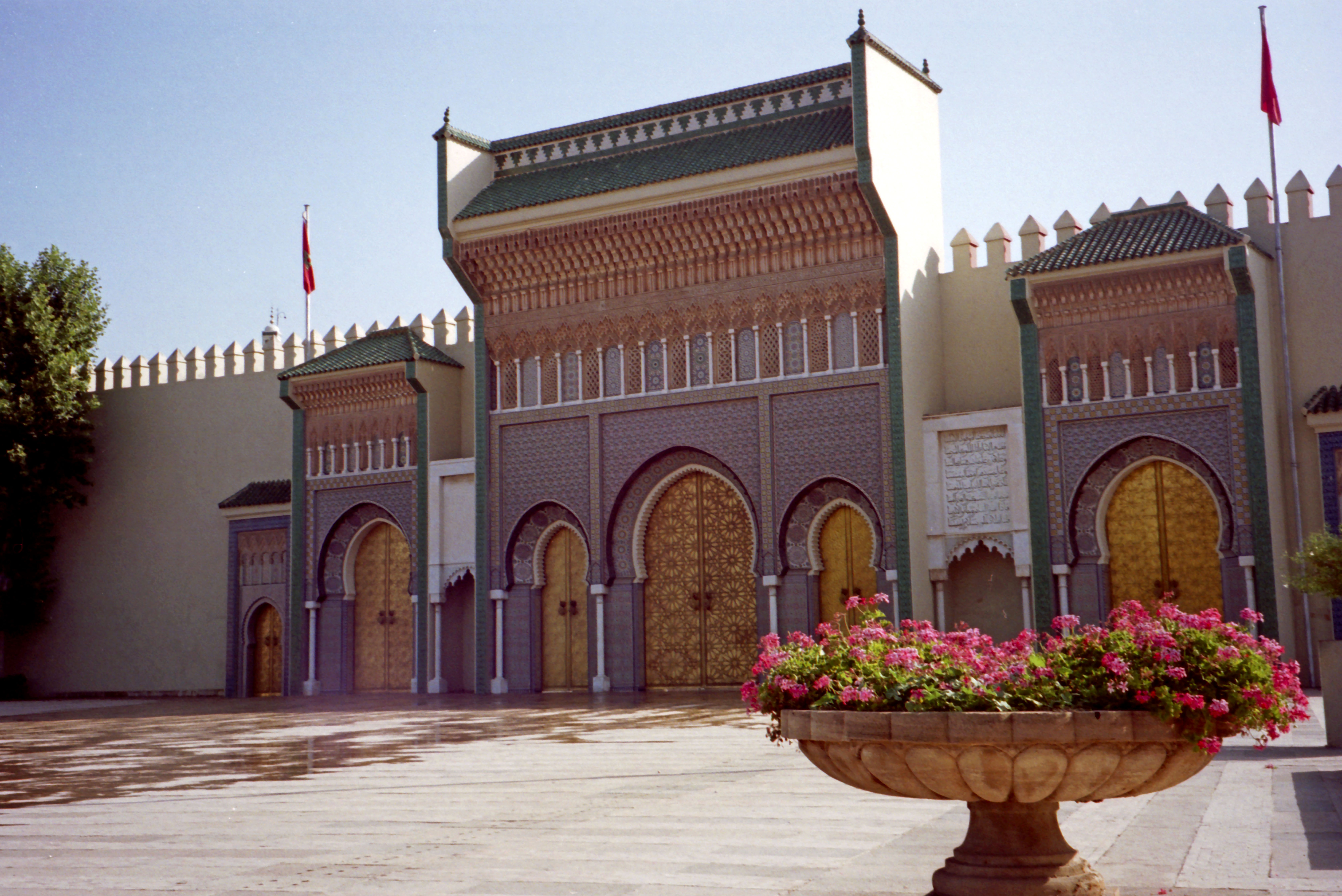 Morocco-110